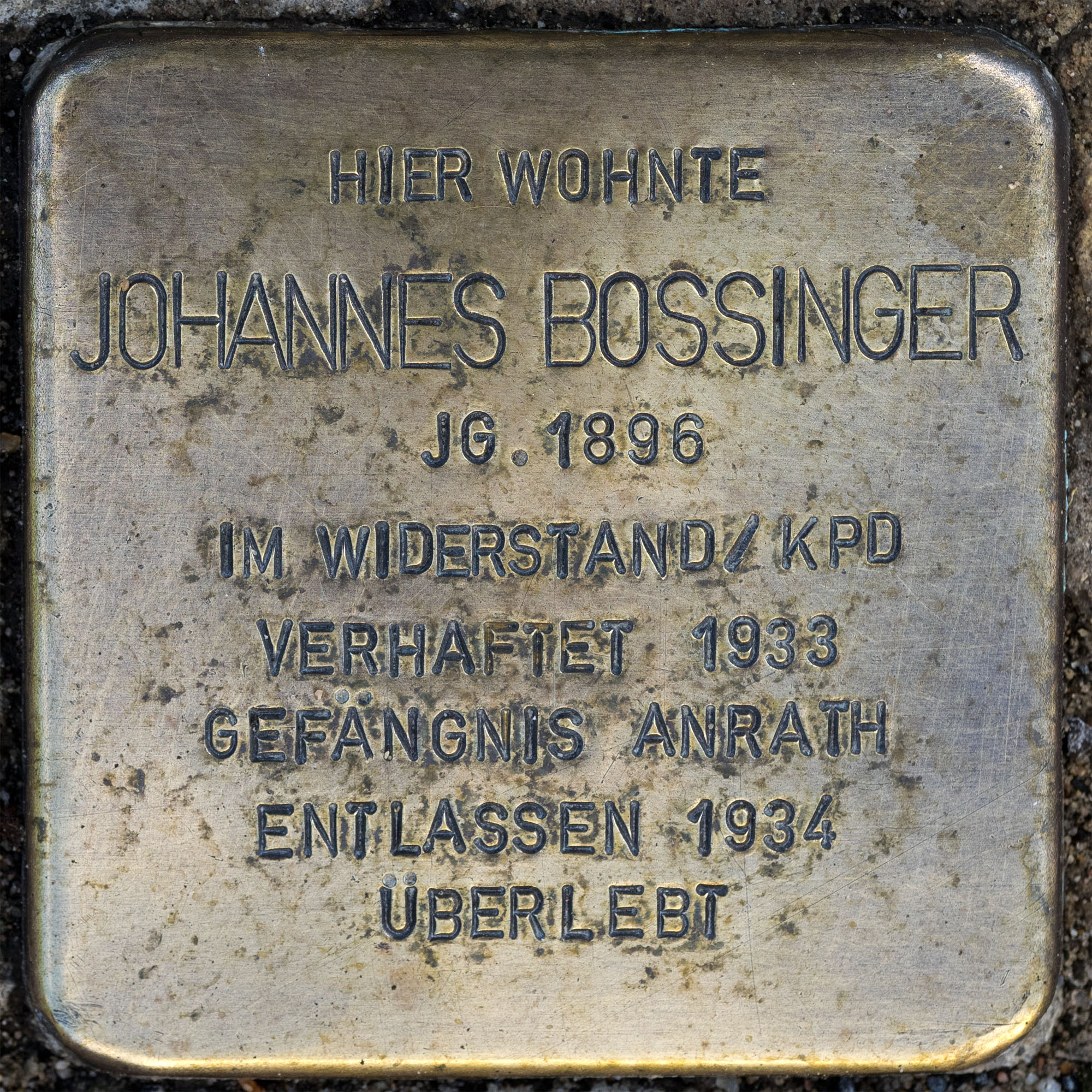 2016 Stolpersteine ToeVo Bossinger Johannes